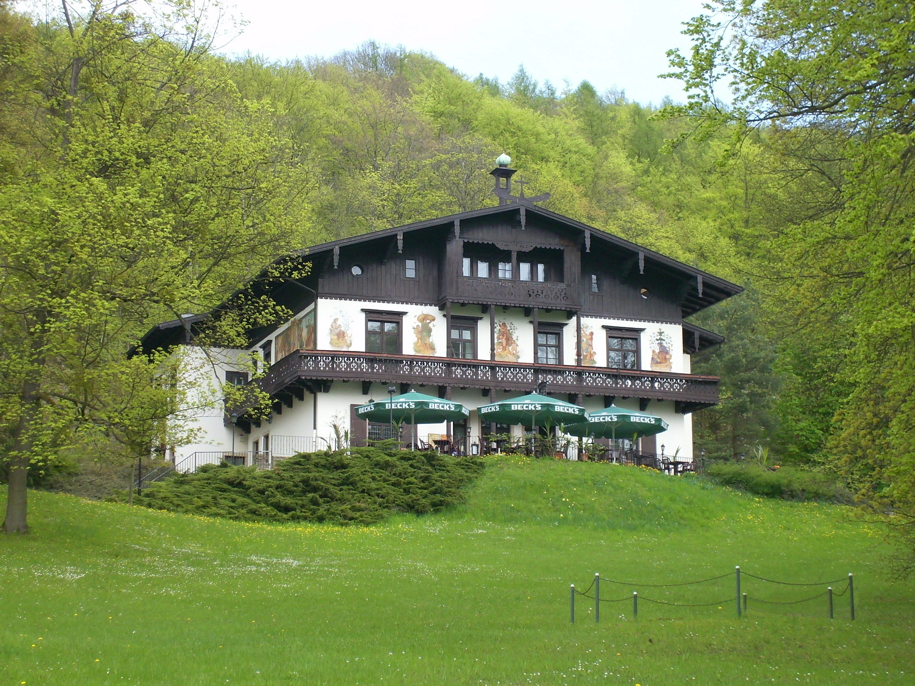 Villa Feodora Bad Liebenstein